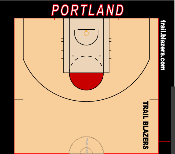 ブレイザーズホームコート配色